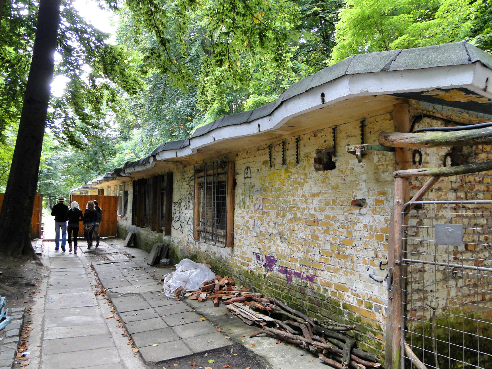 Przedwojenny budynek nad Jeziorem Szmaragdowym